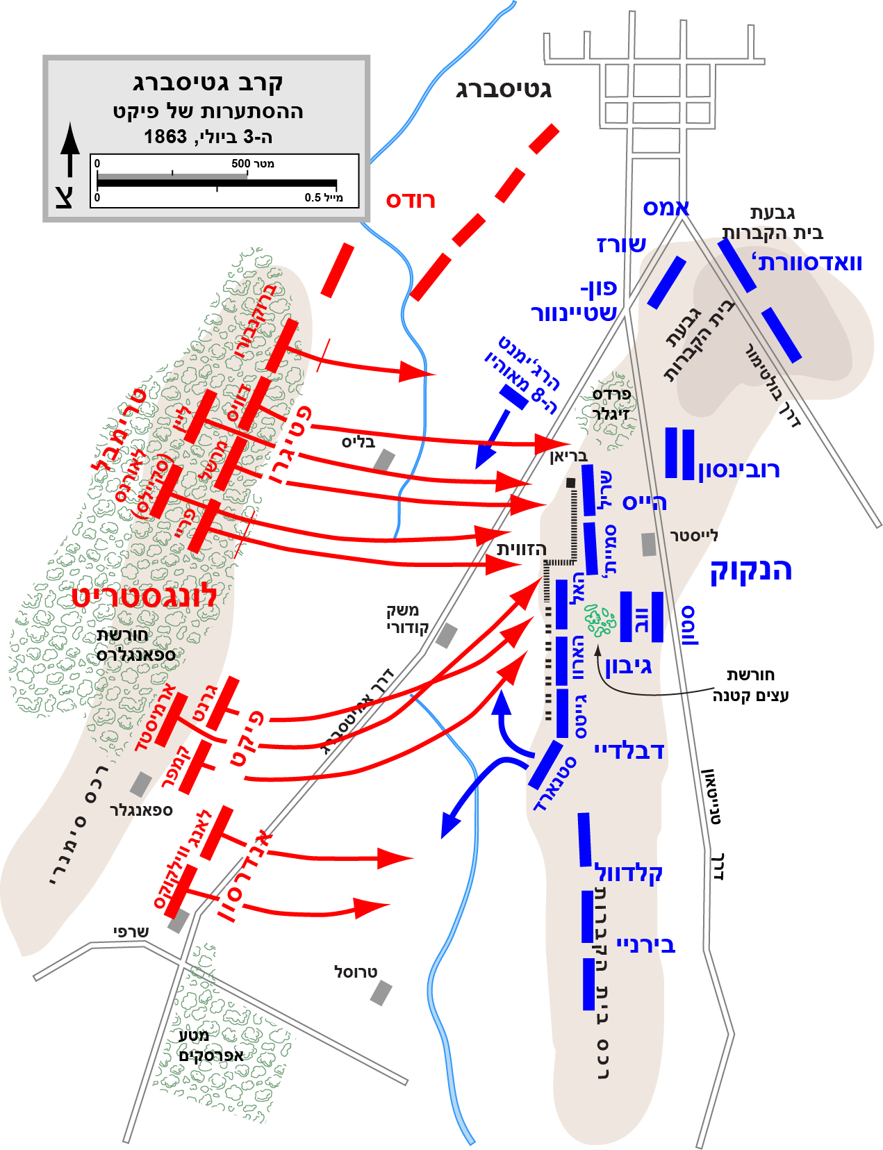 Map of the Battle of Gettysburg of the American Civil War. Drawn in Adobe Illustrator CS5 by Hal Jespersen. Graphic source file is available at